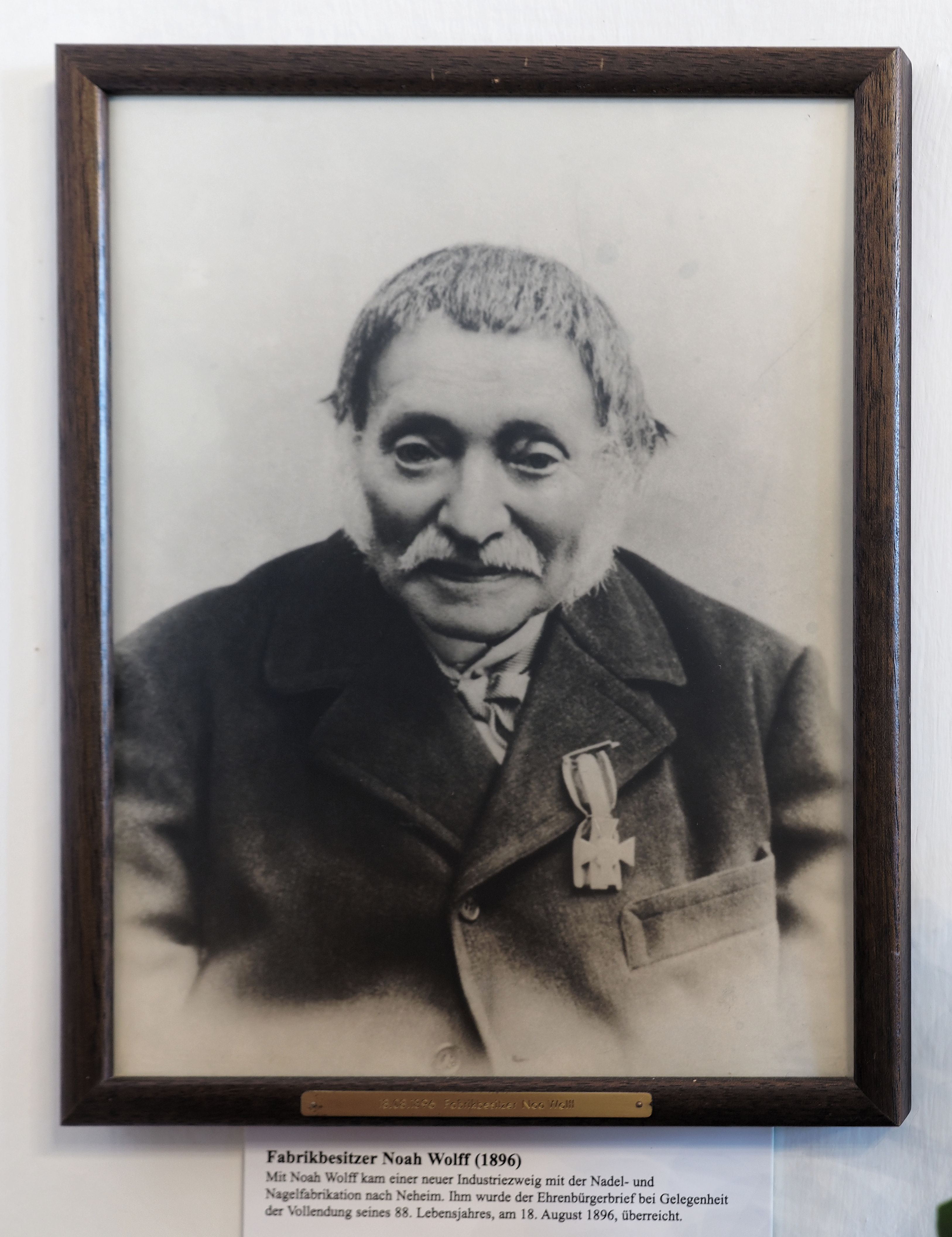 Foto von 1896 des Fabrikbesitzers Noah Wolff im Fresekenhof Fresekenplatz 6 in Neheim